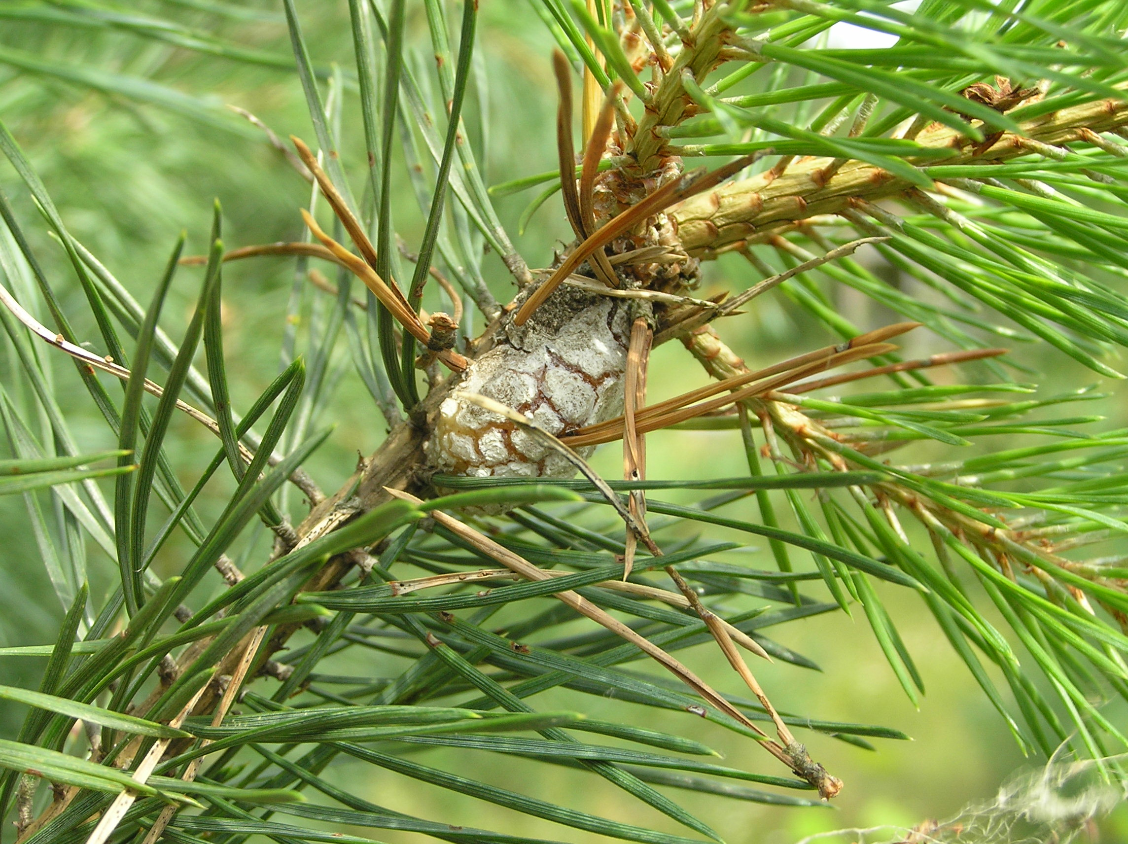 Retinia resinella (syn. Petrova resinella, Petrova rexinella), Zwójka żywiczanaczka - żywiczny galas wewnątrz którego żeruje larwa.